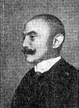 Lőrenthey Imre (1867—1917) magyar paleontológus, geológus, egyetemi tanár, az MTA levelező tagja.